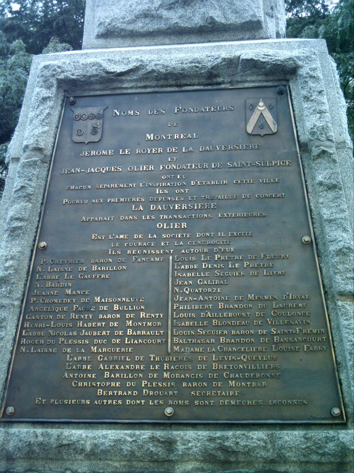 Les noms des fondateurs de Montréal sont inscrits sur une plaque apposée à une obélisque à la place de la Grande-Paix